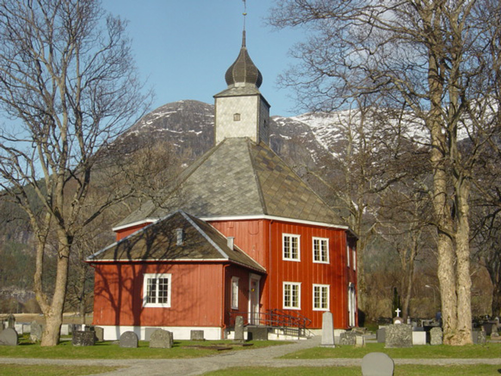 Grytten church, Åndalsnes, in Norway